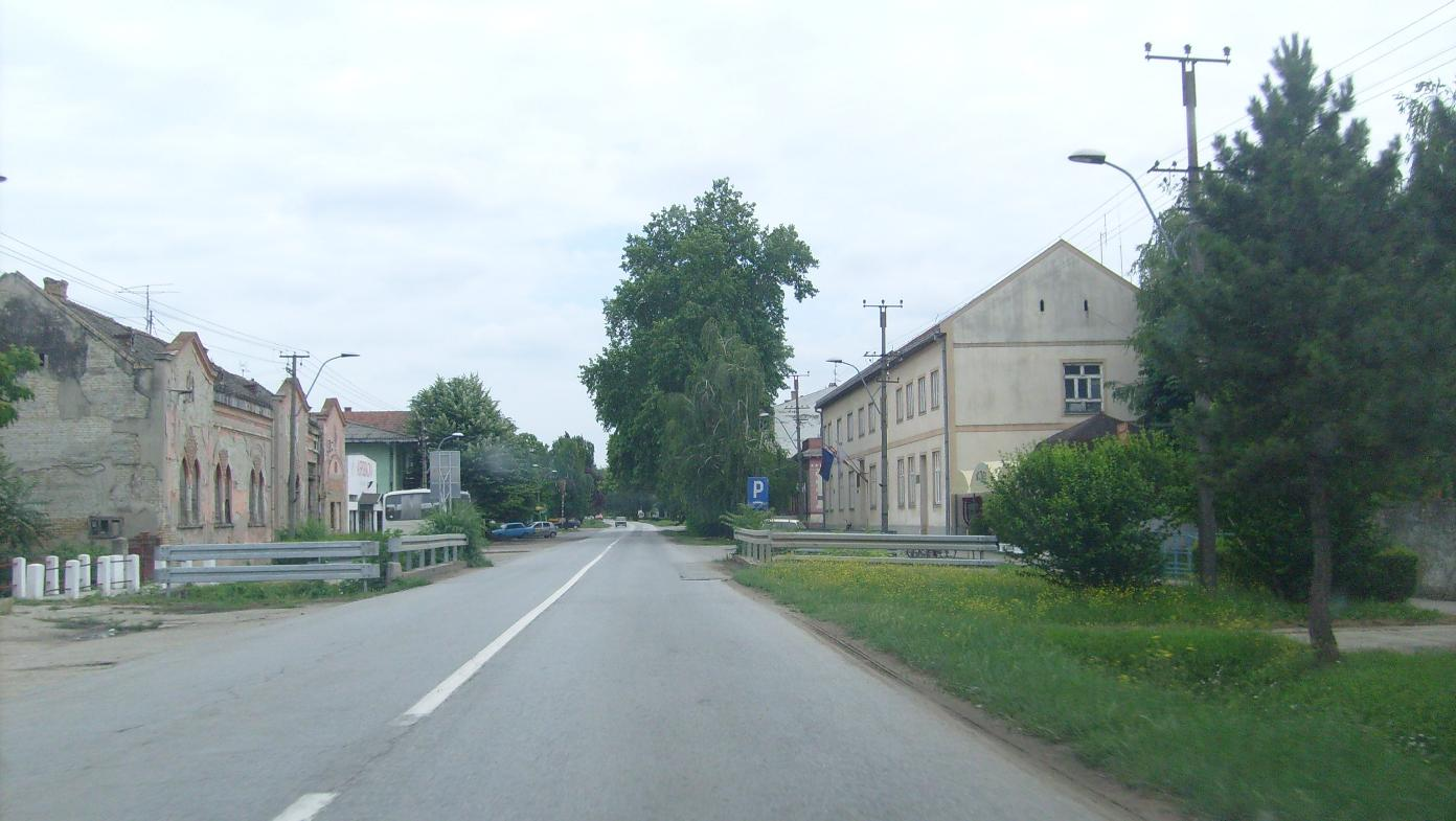 14.06.2008. _ Mali Idjos_Kishegyes